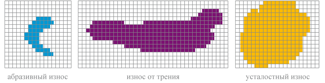 Фрагмент атласа износа // Fragment wear atlas